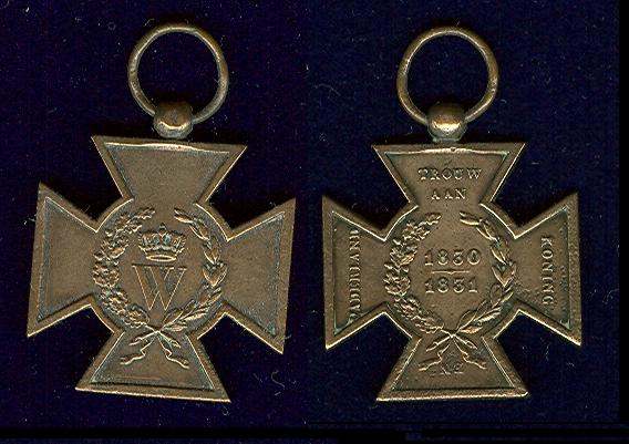 Kruis uit mijn verzameling. Eigen scan. Dit is volgens overlevering de decoratie die Jan Goeverneur heeft ontvangen. Ingesteld bij Koninklijk besluit no. 70 van 12 september 1831 en uitgereikt aan allen, die aan de krijgsverrichtingen in de jaren 1830 en 1831 hebben deelgenomen. Het brons waaruit het kruis werd vervaardigd werd gehaald uit een tweetal bij de door Nederland gewonnen Slag om Hasselt ( op 8 augustus 1831) veroverde kanonnen. Het ( hier missende) lint is verdeeld in zes gelijke banen blauw en oranje, beginend aan de linkerzijde met een blauwe baan. Zij, die, zonder dienstplichtig te zijn en die zich zonder handgeld in dienst hebben begeven, kregen het Metalen Kruis Vrijwilligers 1830-1831. Deze onderscheiding was gelijk aan bovenstaande, zij het dat op de bovenste arm het woord "VRIJWILLIG" en reliëf stond.Het lint is verdeeld in zes gelijke banen groen en oranje, beginend aan de linkerzijde met een groene baan.